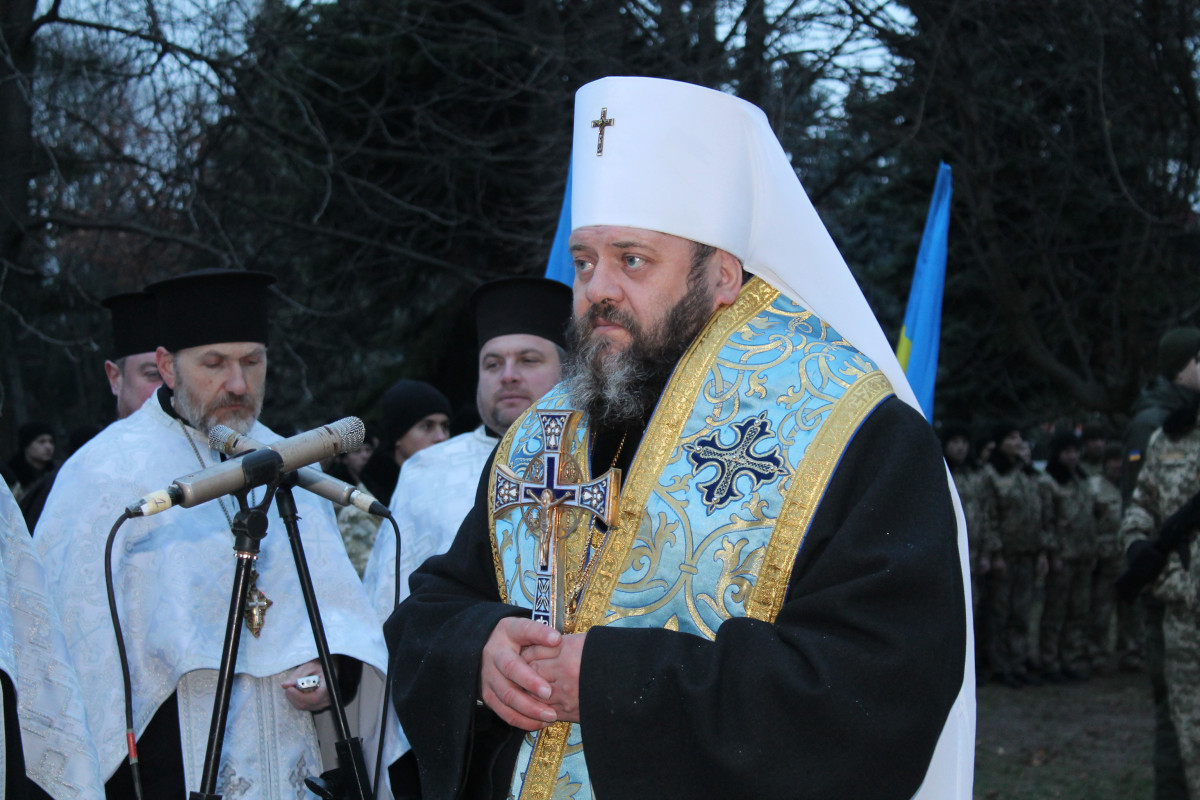 Митрополит Луцький і Волинський Михаїл (Зінкевич) на урочистому заході з нагоди Дня Революції Гідності 21 листопада 2018 року.